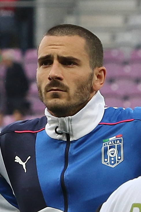 20150616 - Portugal - Italie - Genève - Leonardo Bonucci